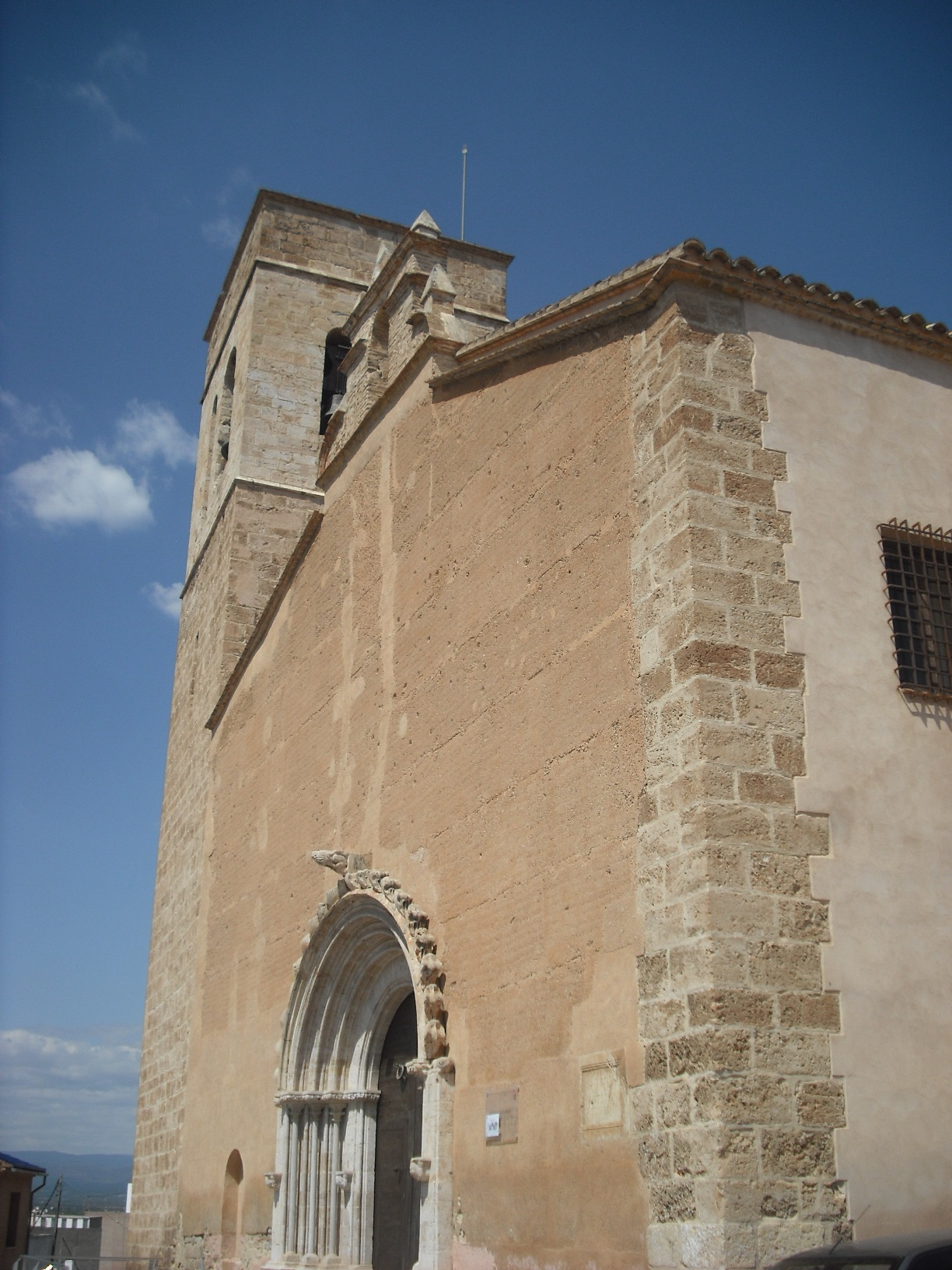 Església de la Sang de Llíria.